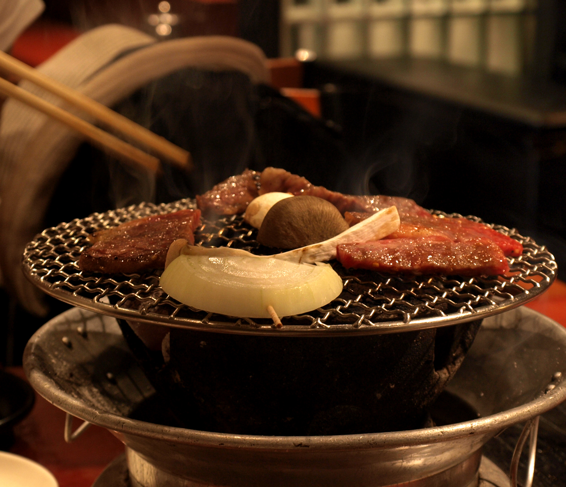 焼肉(七輪)